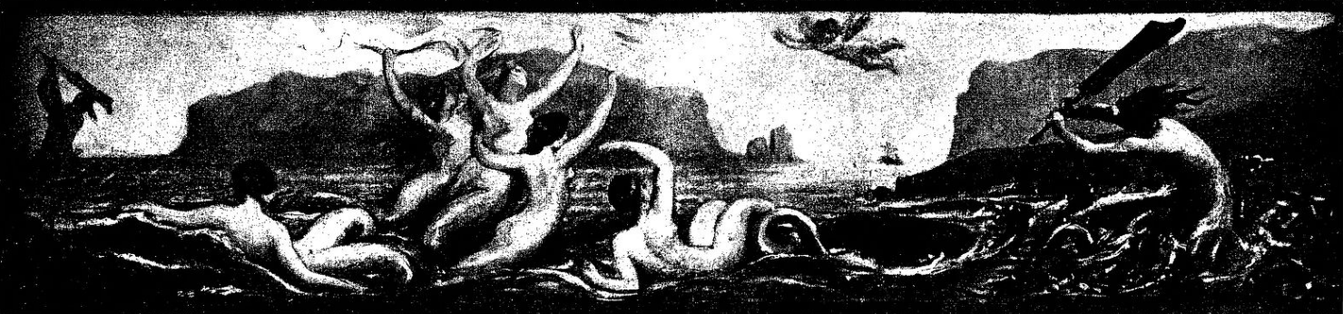 Le chant des Sirènes dans Une famille de républicains fouriéristes : les Milliet de Paul Milliet (Q3371845), premier volume, page LVI.